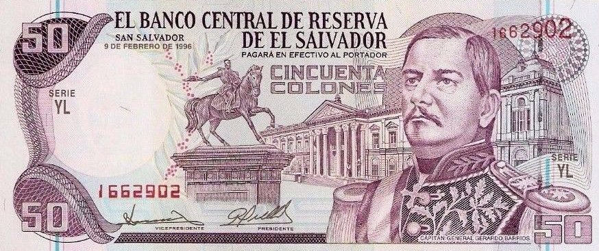 Un antiguo colon con la imagen del Presidente Barrios